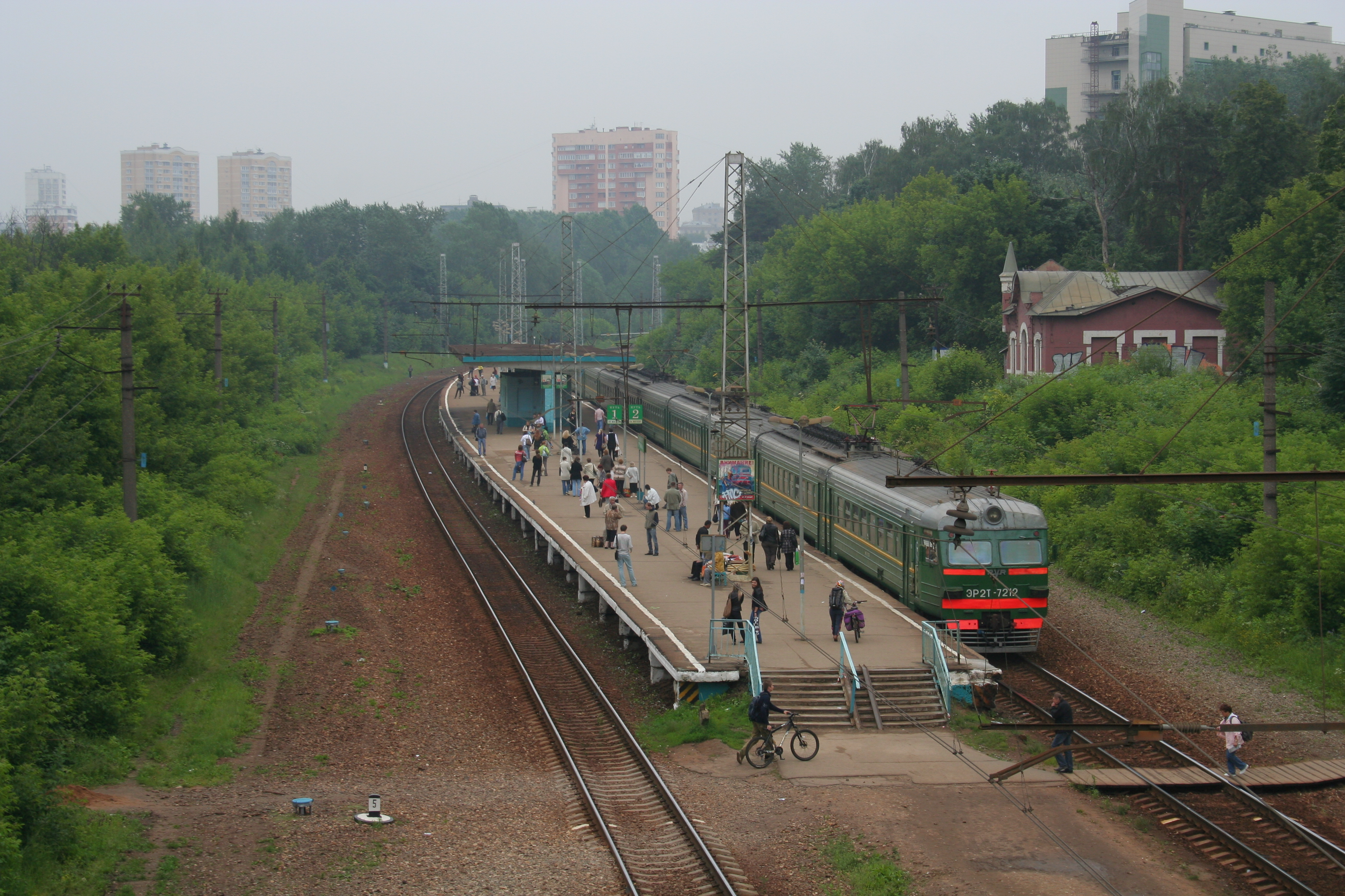 Haltepunkt Pokrowskoje-Streschnewo in Moskau.